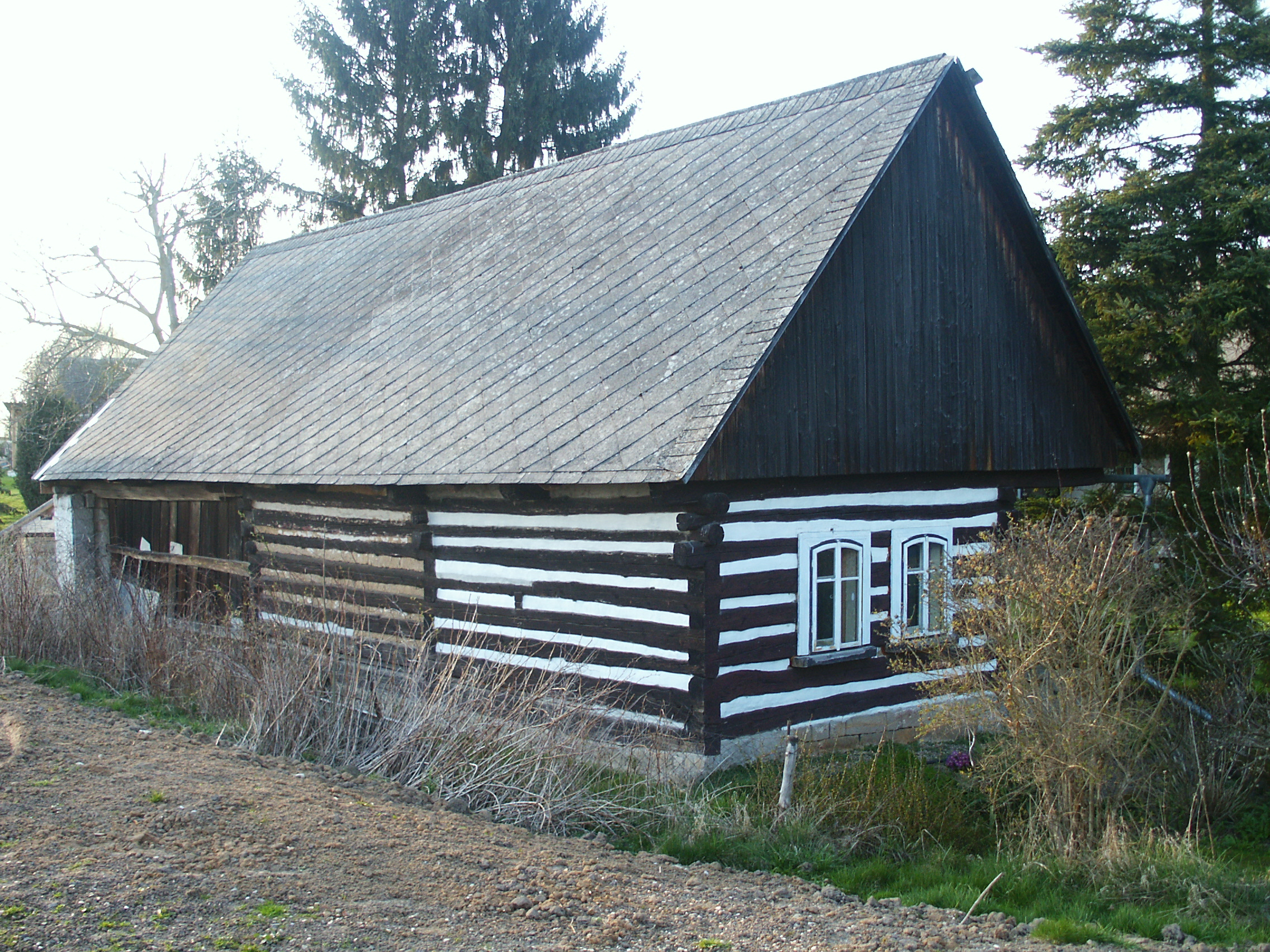 Holín - stavení u č.p.30